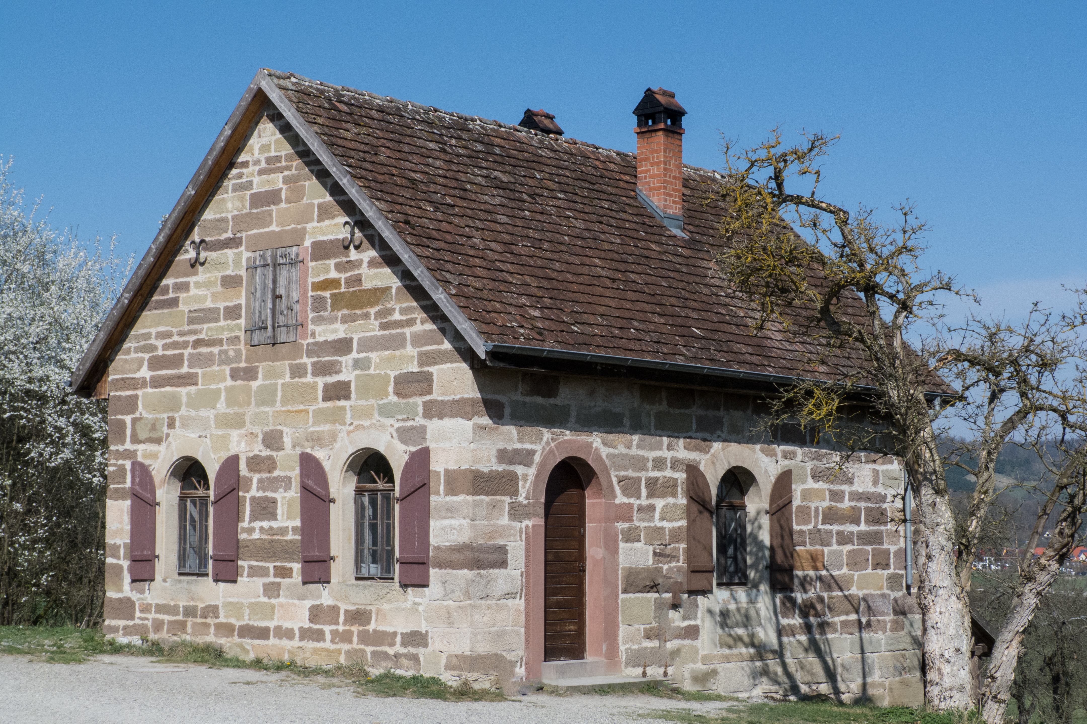 Das 1839/40 erbaute Gemeindebackhaus aus Beilstein, das bis ins Jahr 1961 in Betrieb war, im Hohenloher Freilandmuseum Wackershofen.